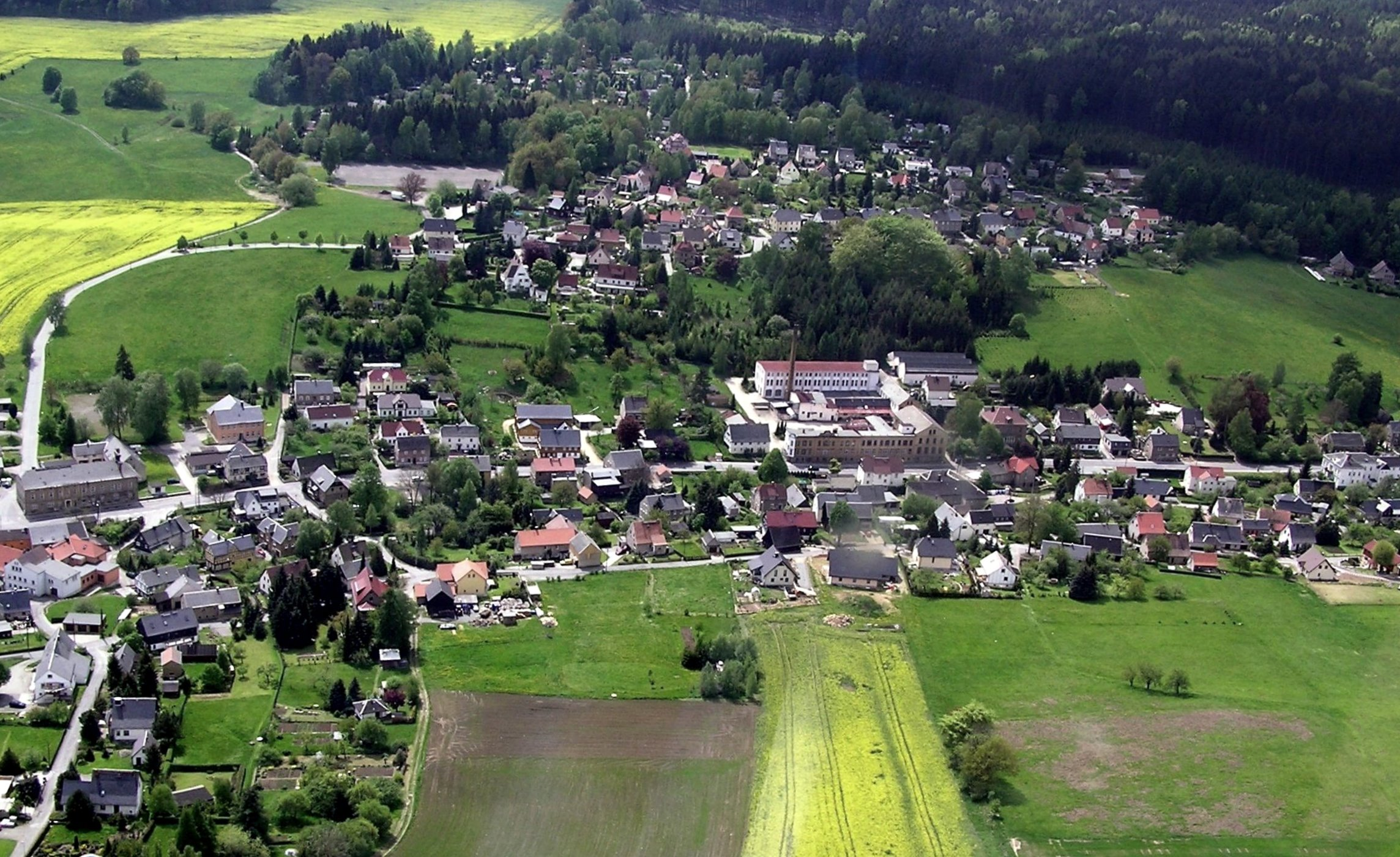 Luftbild vom Ortsteil Ringenhain Richtung Südwesten